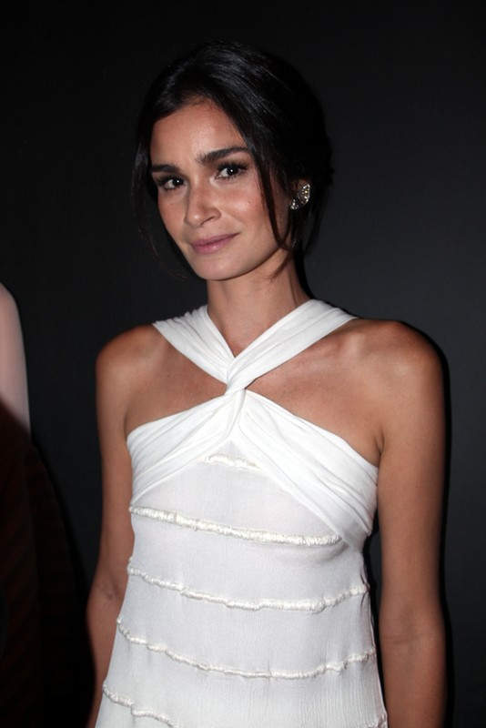 13 - Carol Ribeiro